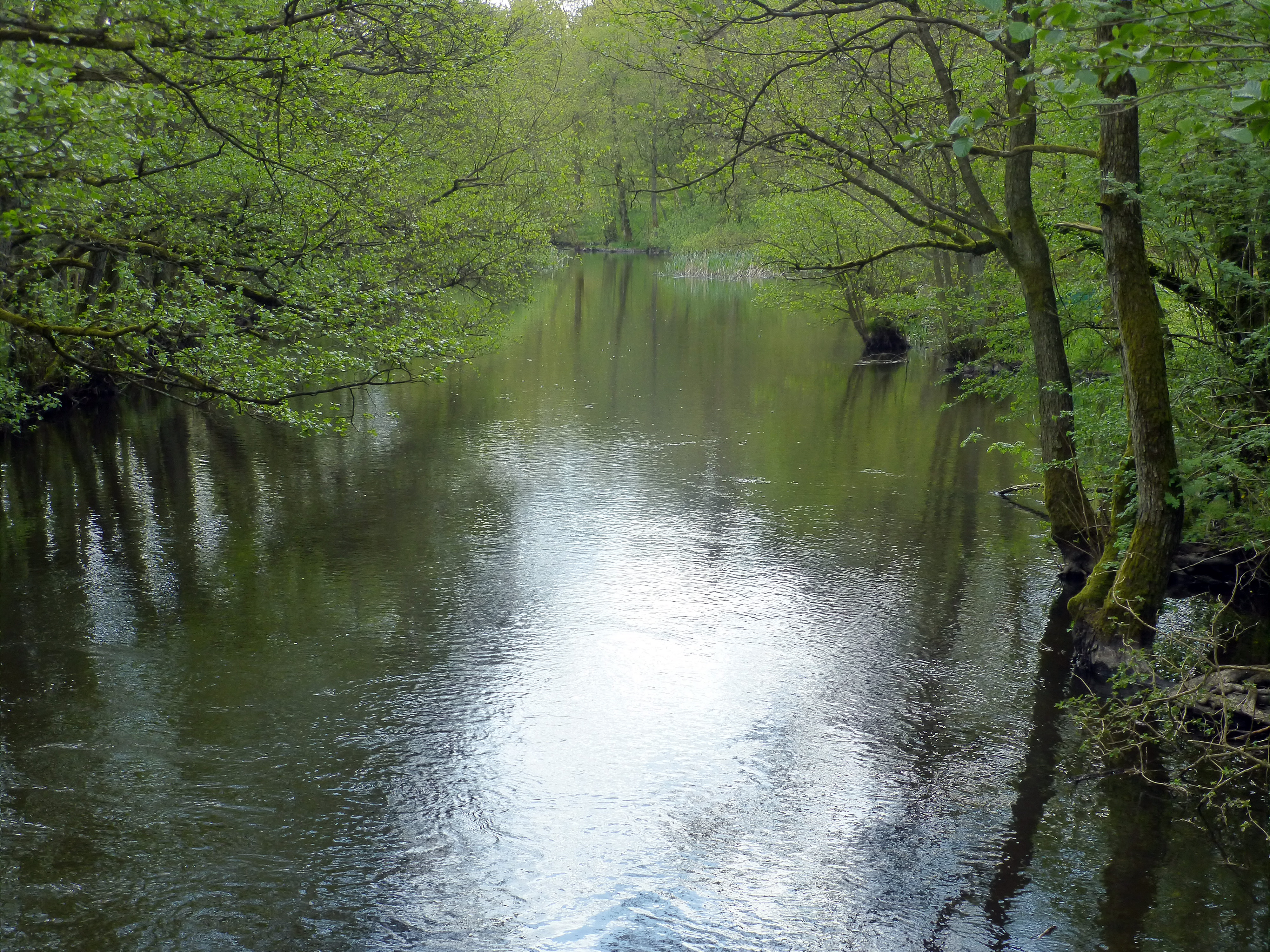 Salten Å ved Rye Bro set mod øst